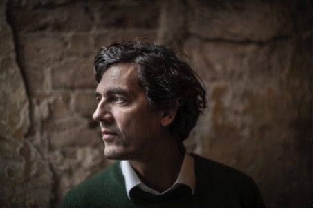 Porträt von David Regehr